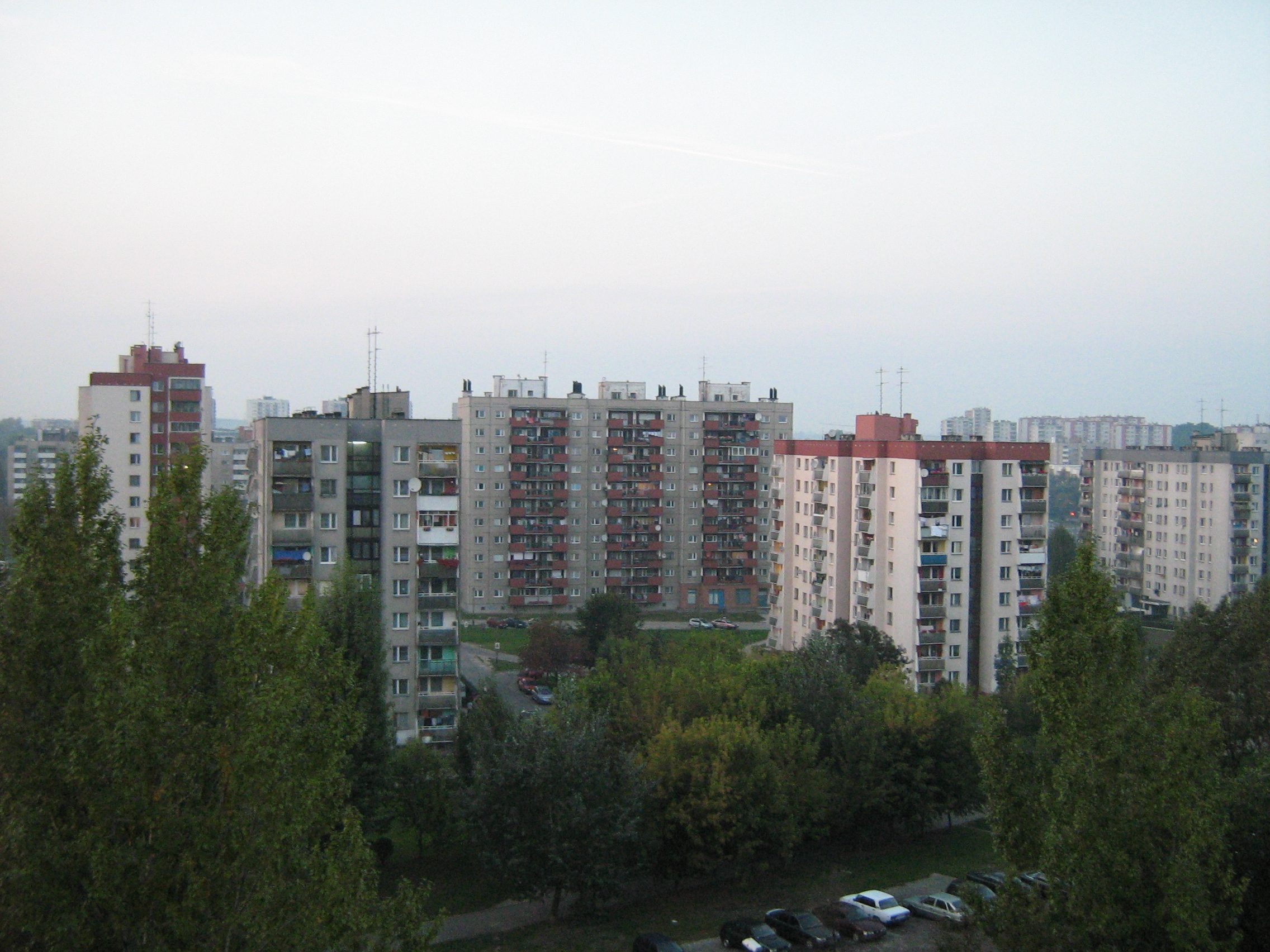 Osiedle Kombatantów na Nowej Hucie (Kraków)